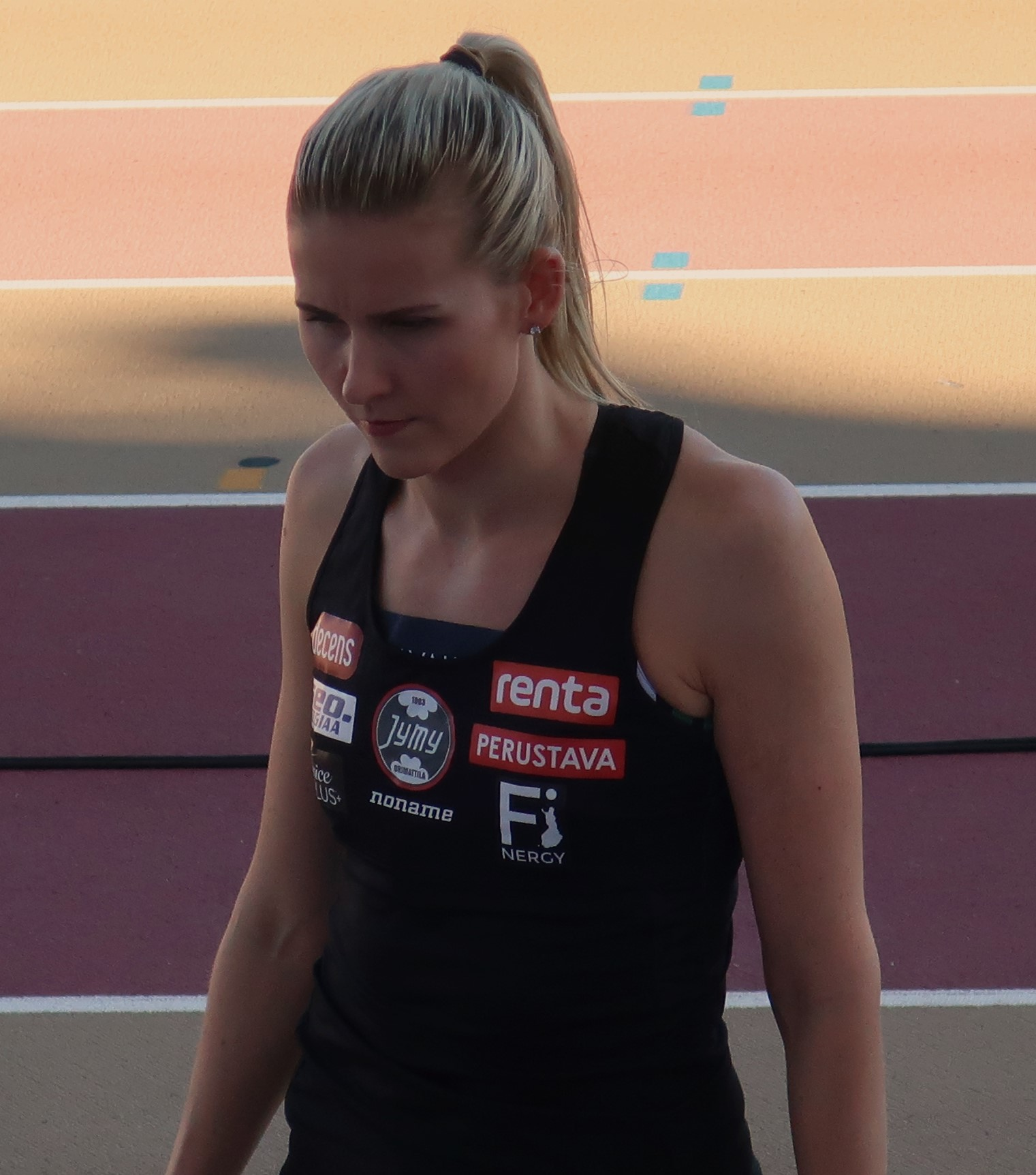 Kristiina Mäkelä kolmiloikan loppukilpailun ollessa käynnissä Kalevan kisoissa 2020.